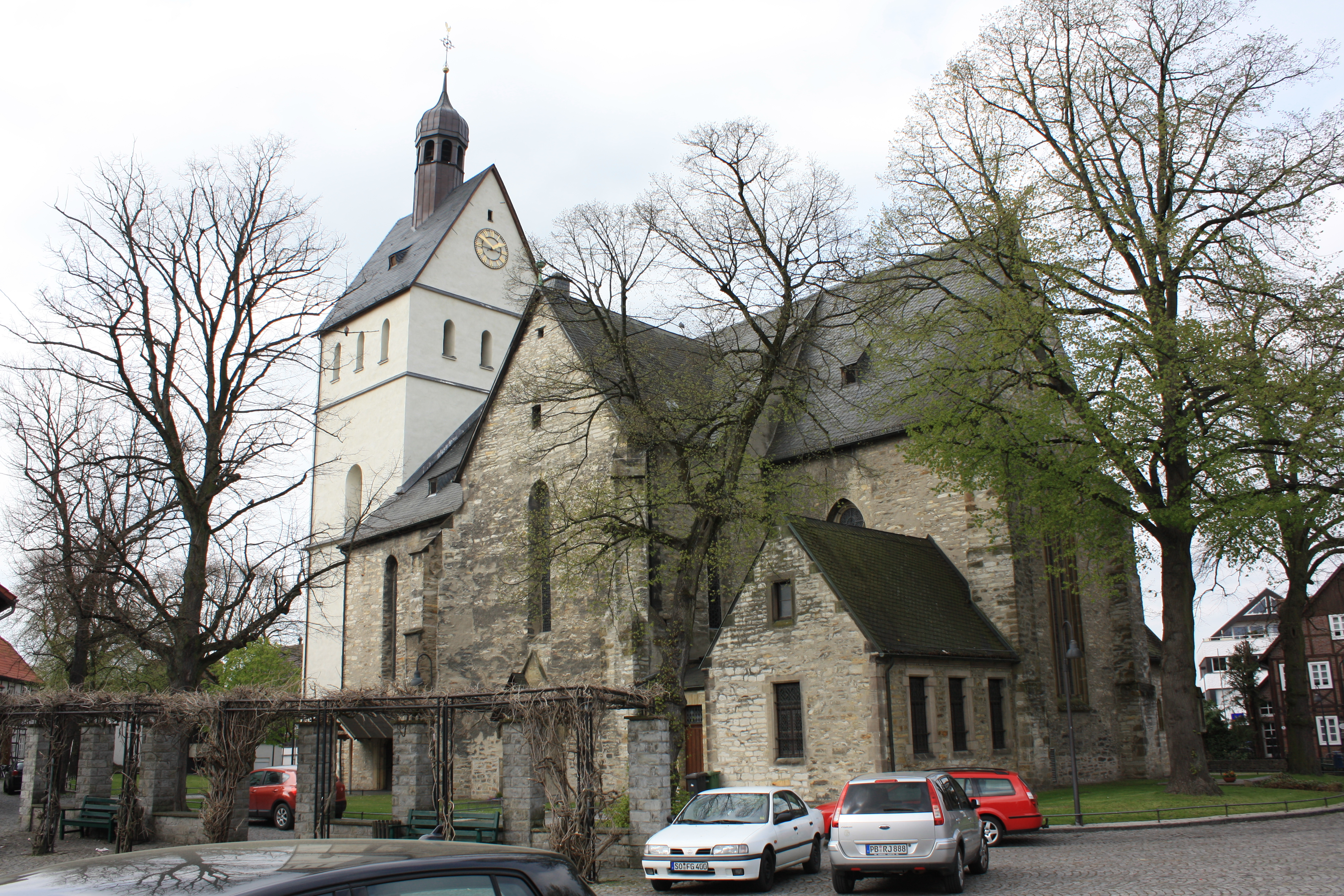 St. Johannes Enthauptung in Salzkotten